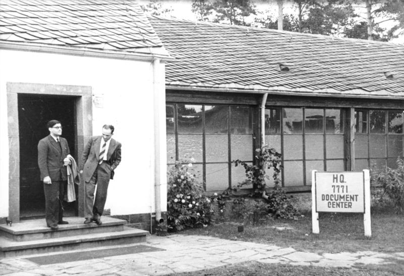 ADN-ZB/Donath "Document-Center" in Berlin-Zehlendorf, amerikanischer Sektor Die Dokumenten - Zentrale untersteht der amerikanischen Militärregierung. Sie enthält eine lückenlose Kartei und Akten über ehemalige Anwärter und Mitglieder der faschistischen Nazipartei, der "NSDAP". UBz.:Eingang zum "Document-Center". Aufn. 1947